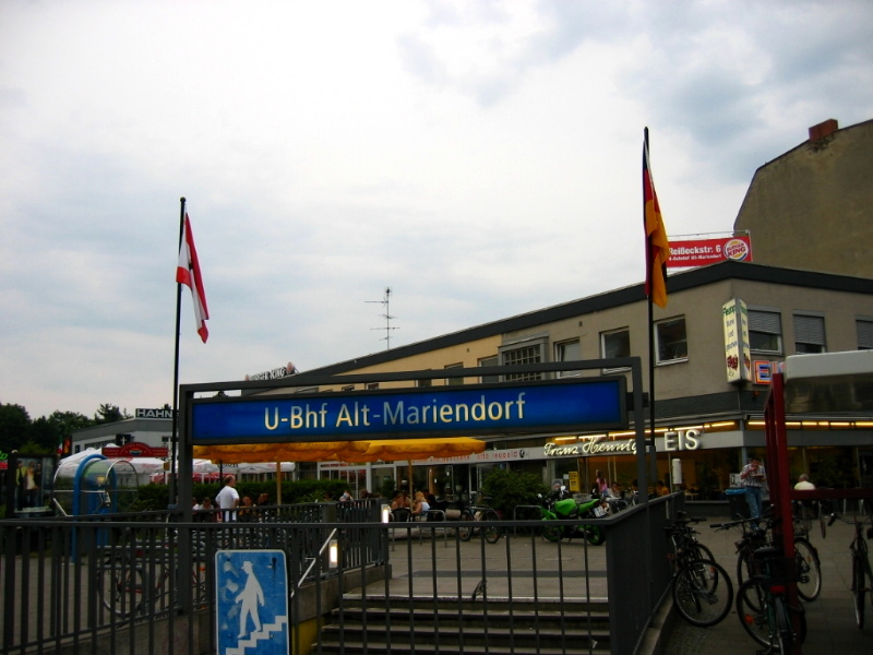 Alt-Mariendorf U-Bahn station.